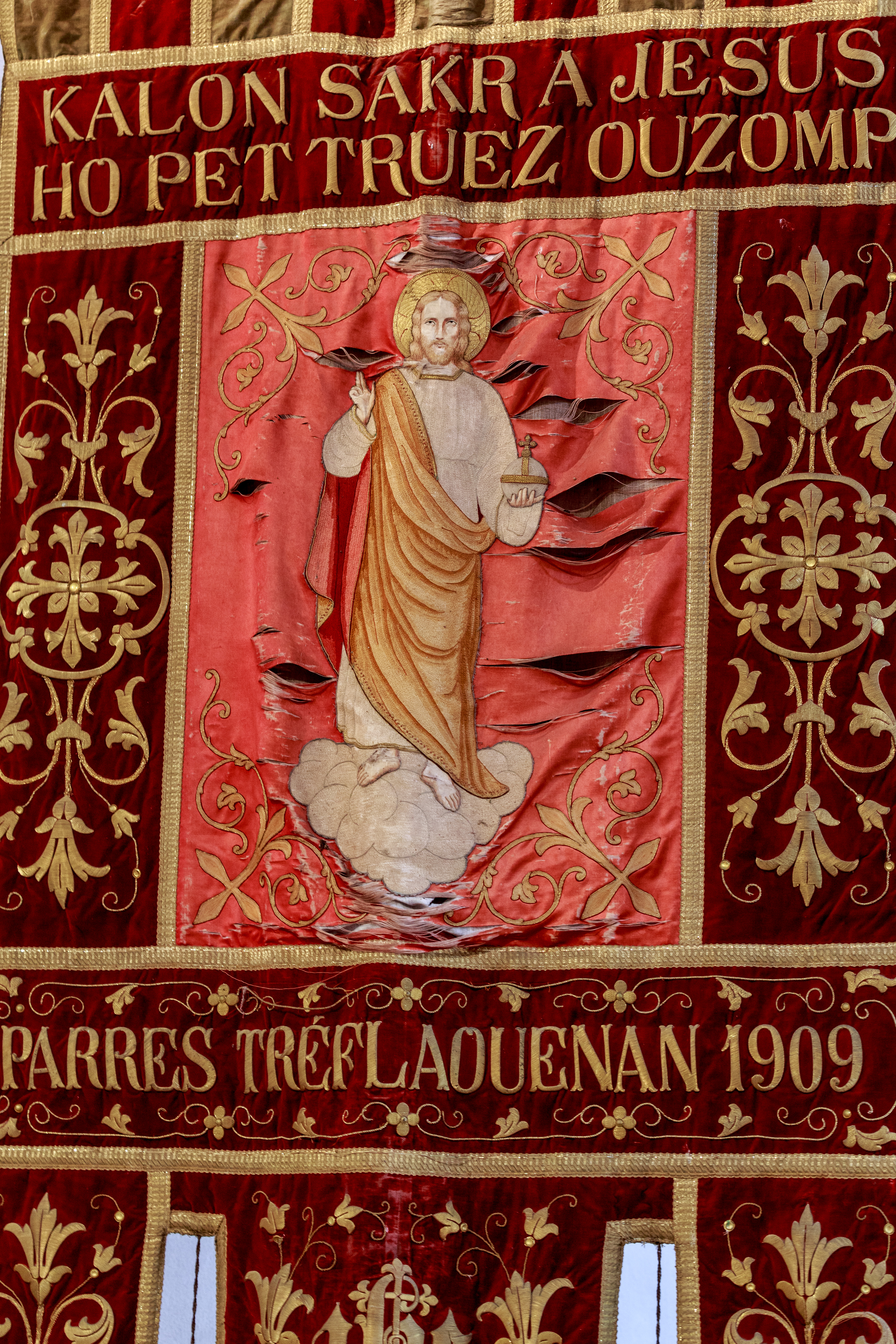 Bannière du Sacré-Cœur en breton dans l'église Saint-Léonor à Tréflaouénan (29).